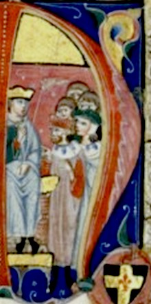 Baudouin IV et Raymond de Tripoli